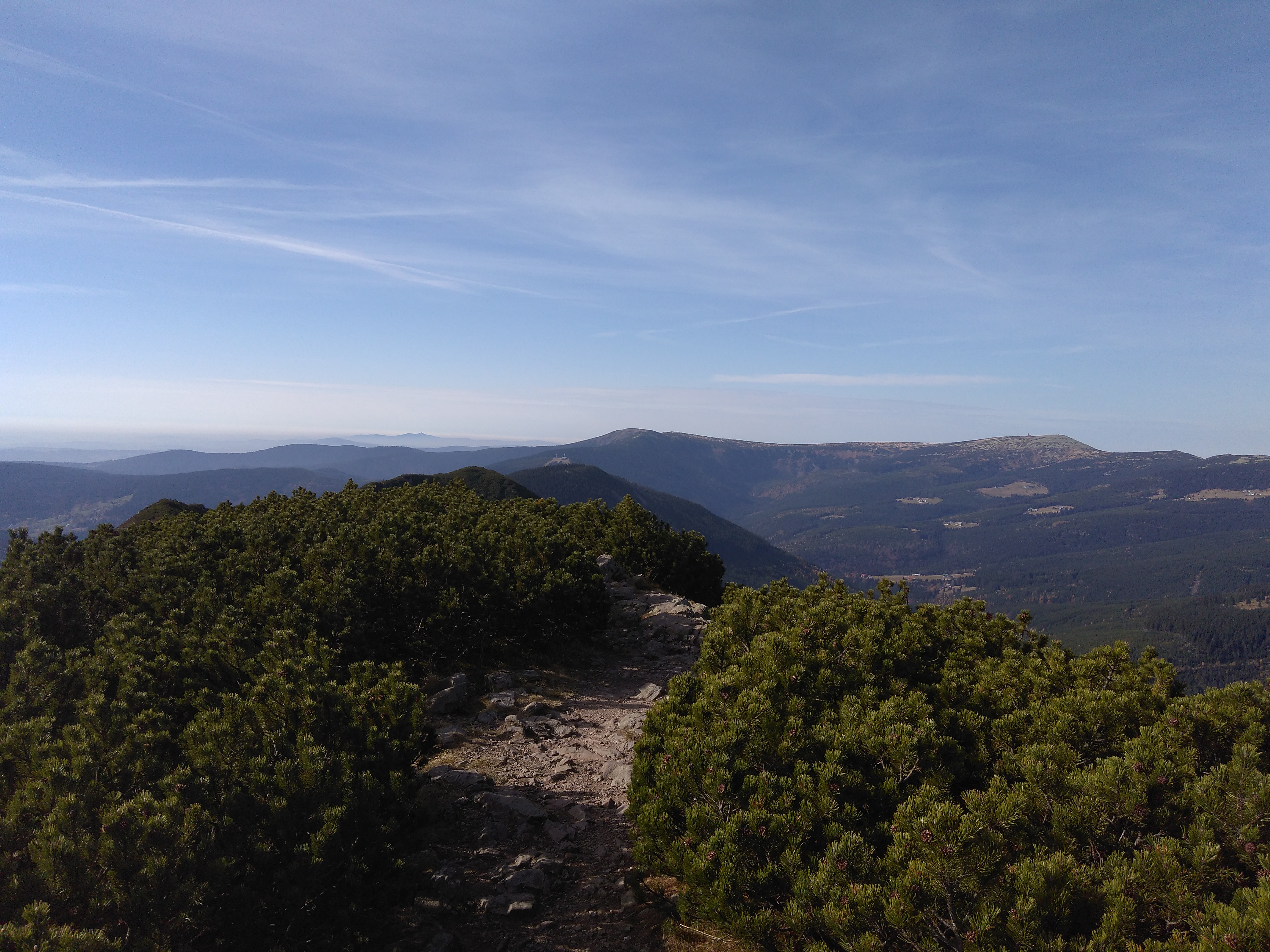 Krakonoš (Kozí hřbety)1